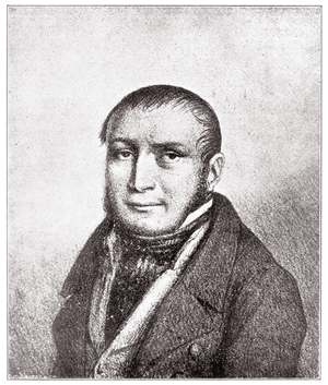 Louis-Charles Mahé de La Bourdonnais. Officieel is Louis de la Bourdonnais nooit wereldkampioen schaken geweest, maar nadat hij in 1834 de Britse schaker Alexander McDonnell in zes matches met totaal 65 partijen verslagen had, was hij wel de sterkste schaker in die tijd.